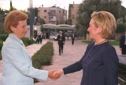 Hillary Rodham Clinton & Reuma Weizman at Beit Hanassi ראומה ויצמן והילרי קלינטון, על רקע הכניסה לבית הנשיא, 1998